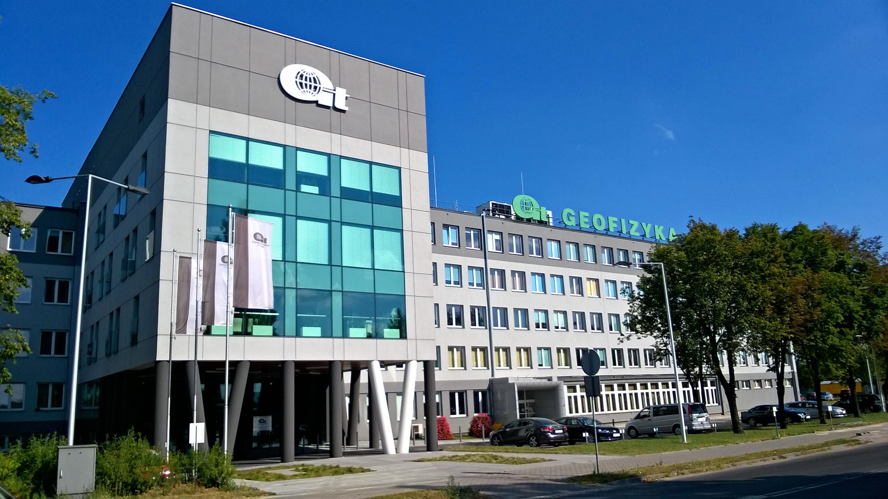 Geofizyka w Toruniu44